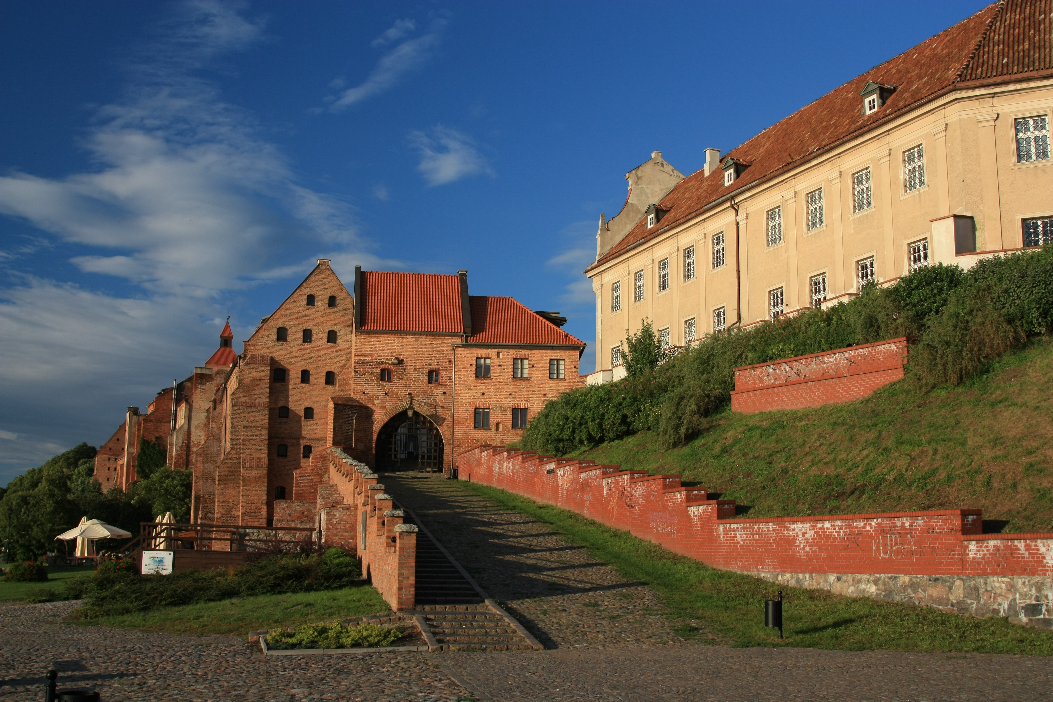 Grudziądz, Brama Wodna, pocz. XIV, XVII, XX brak zabytków w zespole